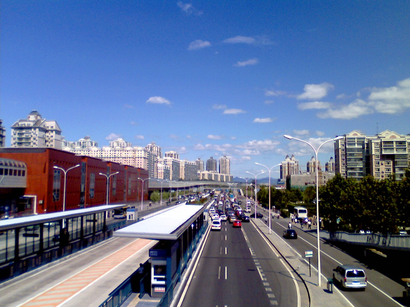 天通苑交通：地铁五号线以及快速公交穿过天通苑社区